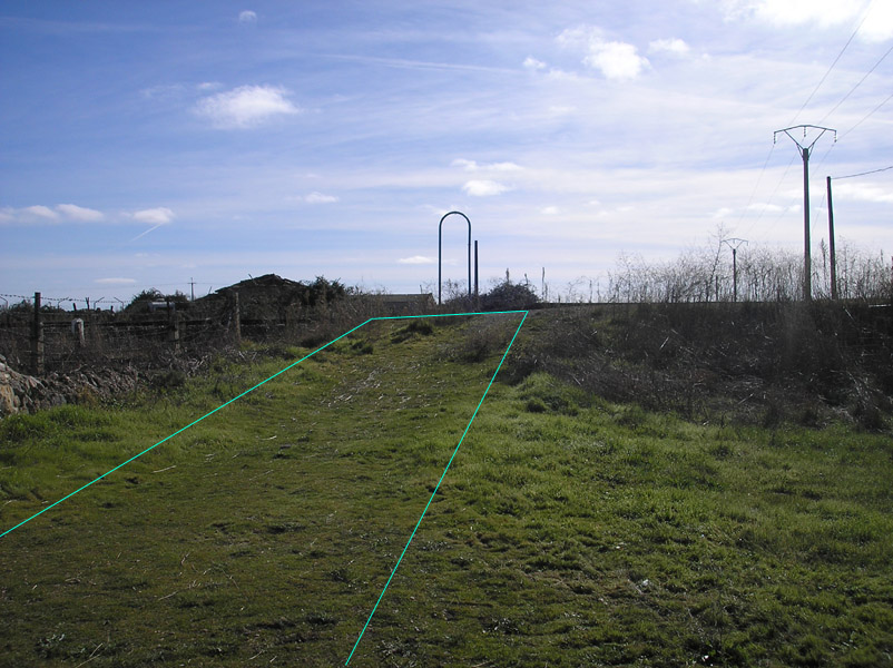 Rampa en el antiguo paso a nivel del p. k. 53,205 de la línea férrea Salamanca - Fuentes de Oñoro.